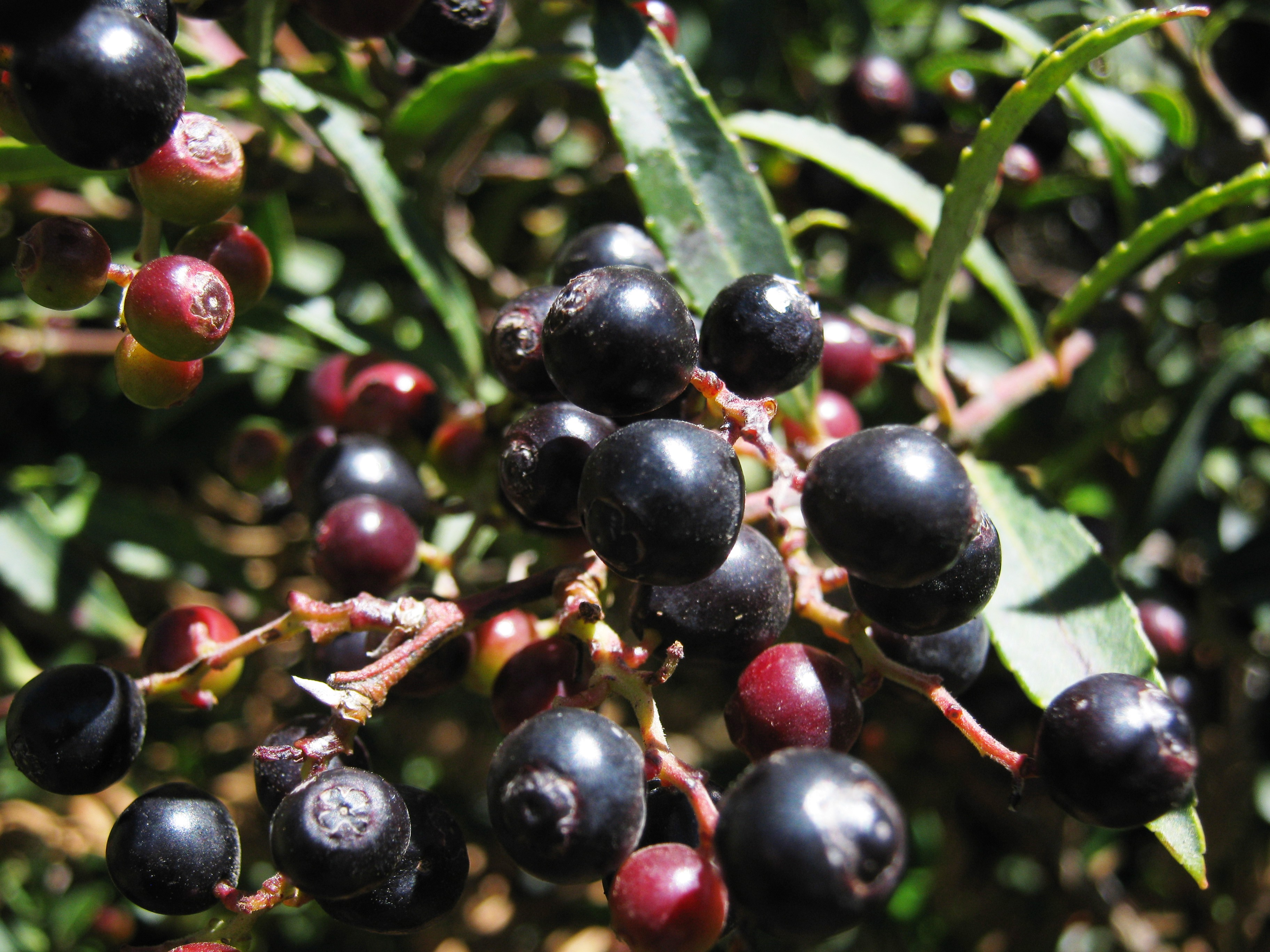 Fotos tomadas en trinidad, Dota